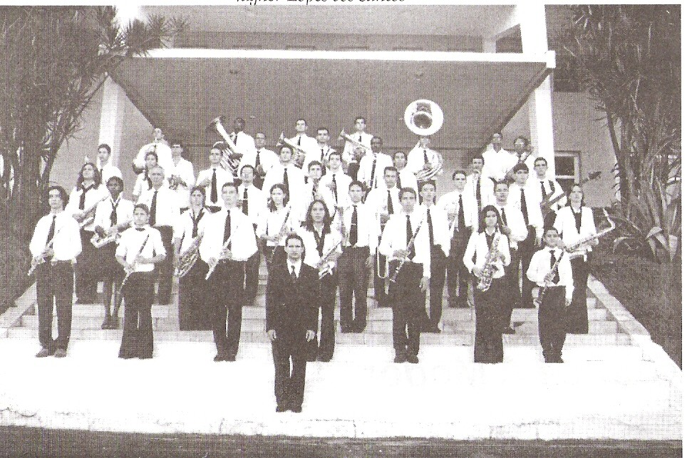 Banda